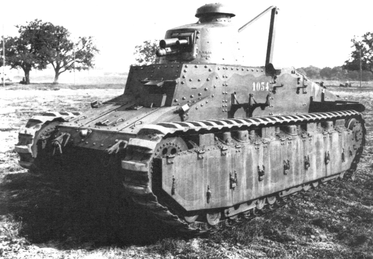 Digitale reproductie foto van de Renault NC31 tank